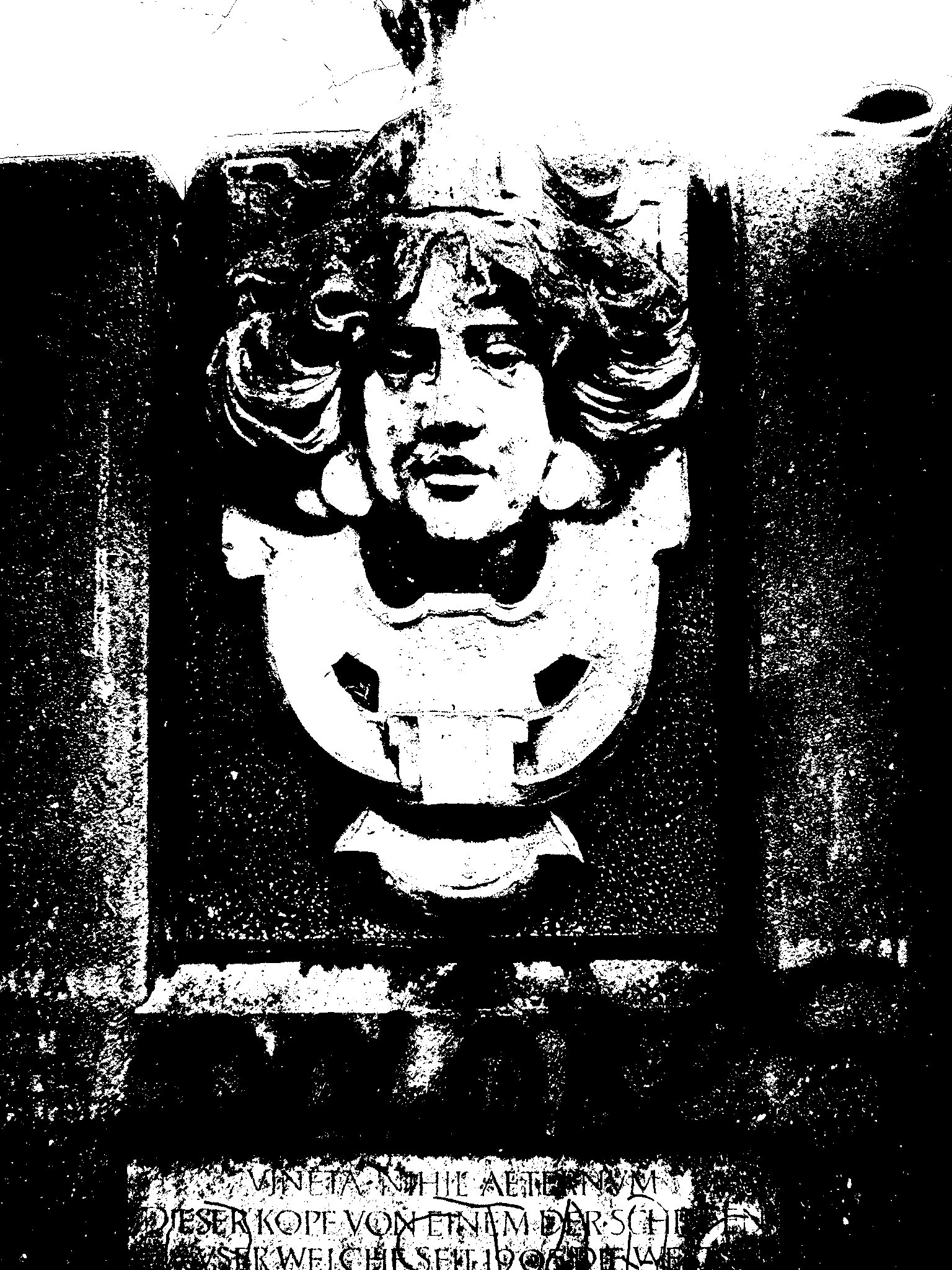 Kiel, Vineta place. Inscription: Vineta nihil aeternum.